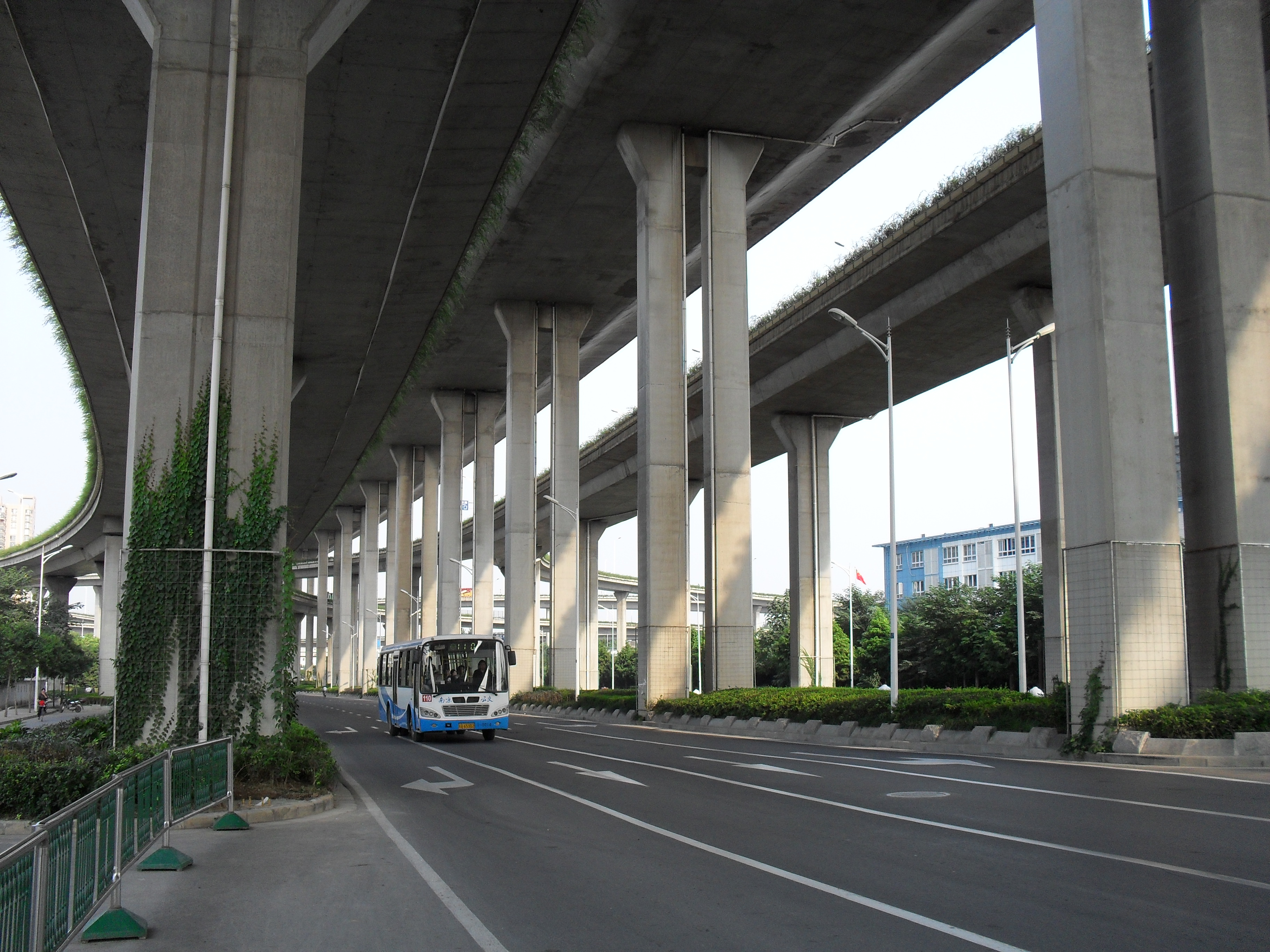 南京市应天大街高架桥双桥门段